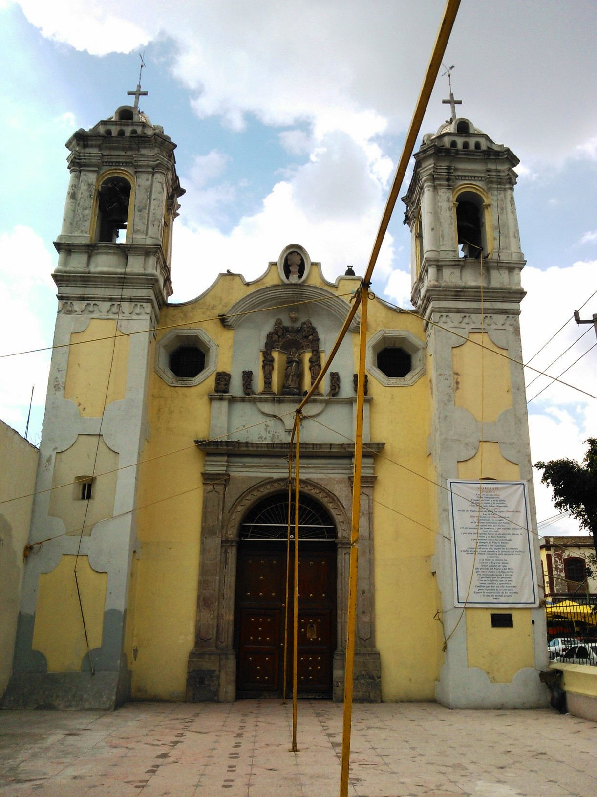 Parroquia de Santa Ana en Peralvillo